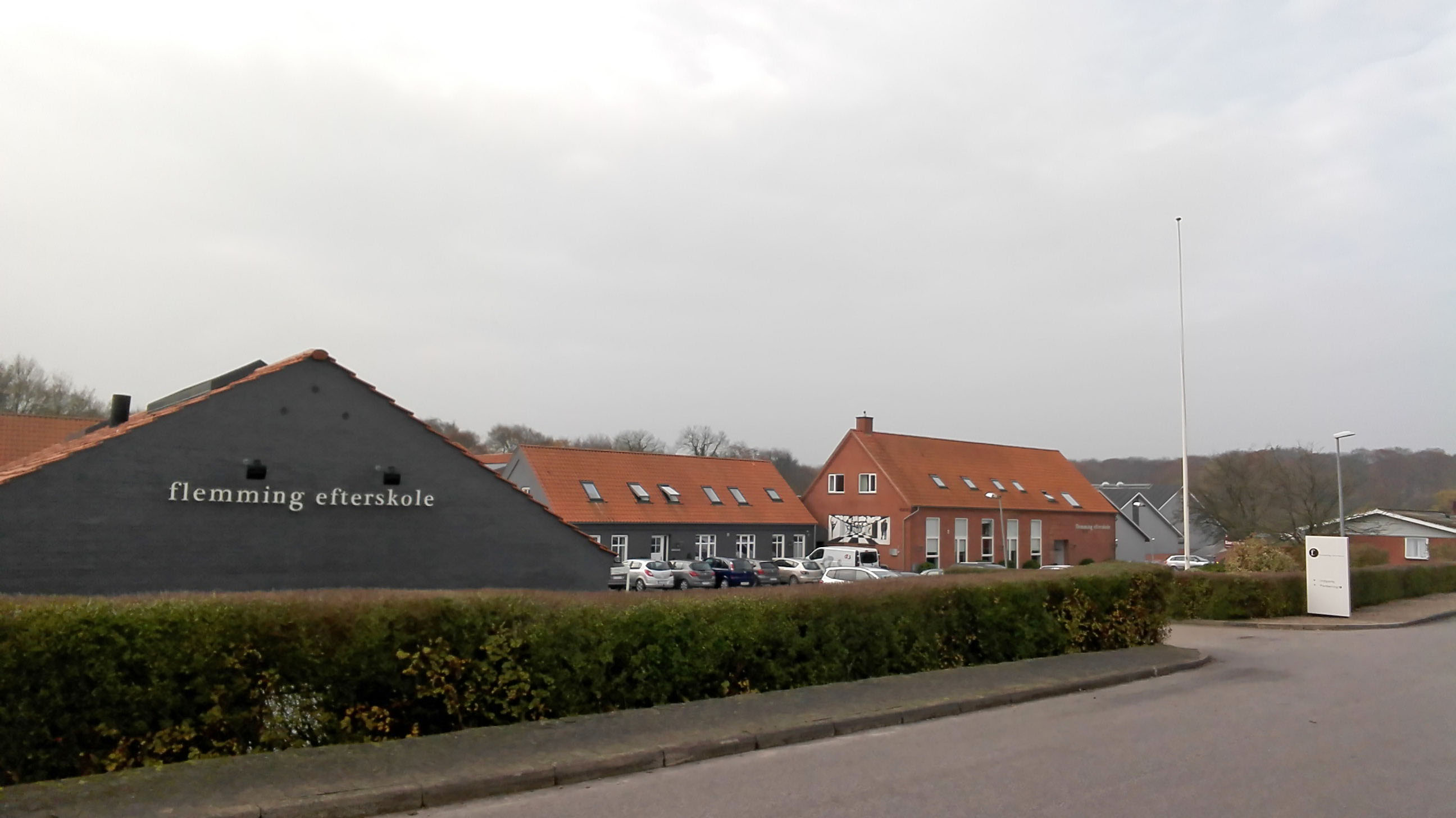 Flemming Efterskole i den sydlige del af Skolesvinget